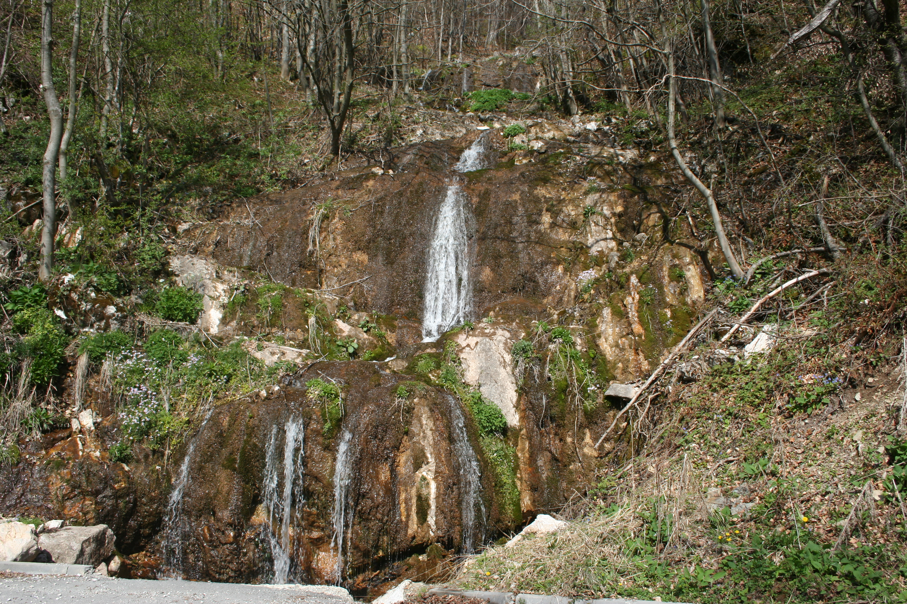 Vodopad, Bobija